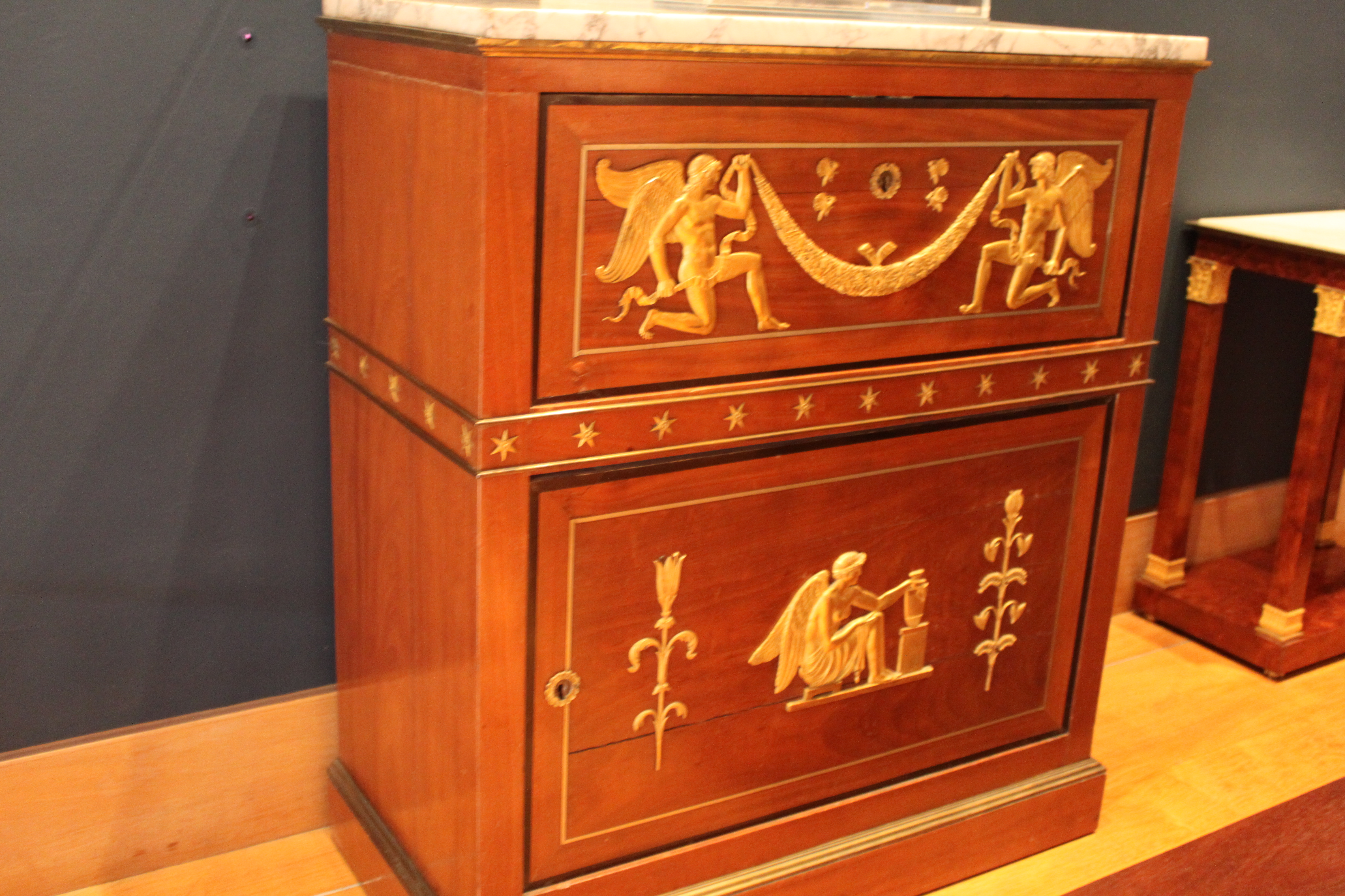 Chambre de Madame Récamier - Secrétaire à abattant - Attribué à Jacob frères, d'après Louis Berthault - vers 1799 - Louvre - Acajou, ébène, cuivre, bronze doré, marbre - OA 11742